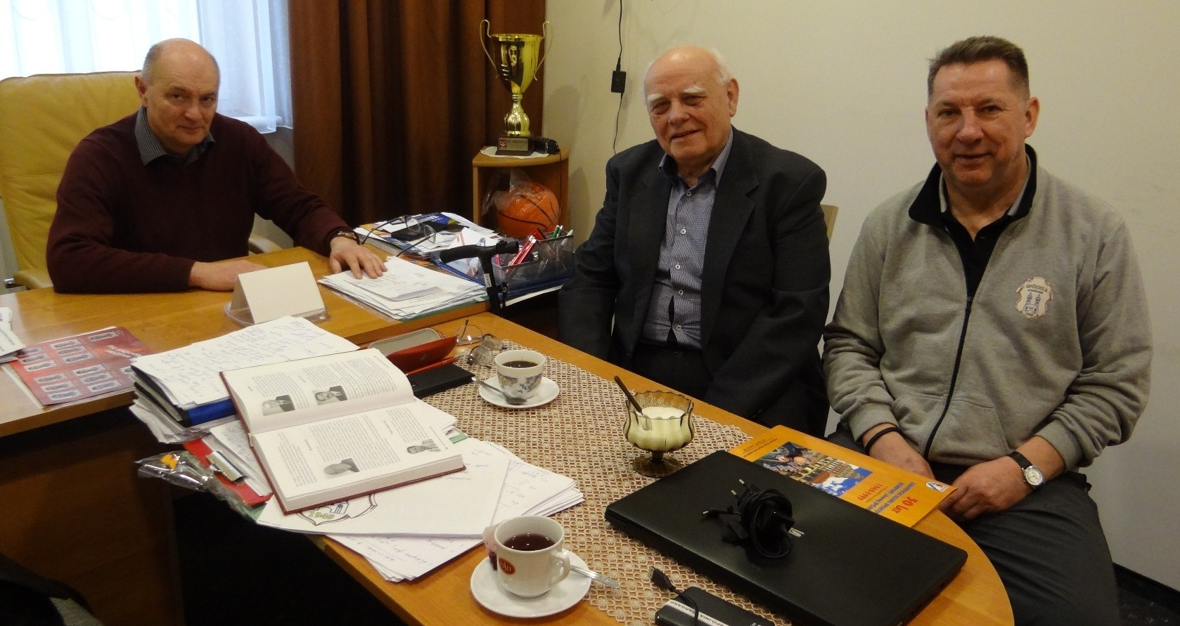 Prezes Tadeusz Gutowski, trener Krzysztof Koziorowicz podczas spotkania w klubie z Tadeuszem Sikorą